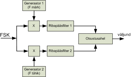 Sünkroonse FSK detektori plokkskeem